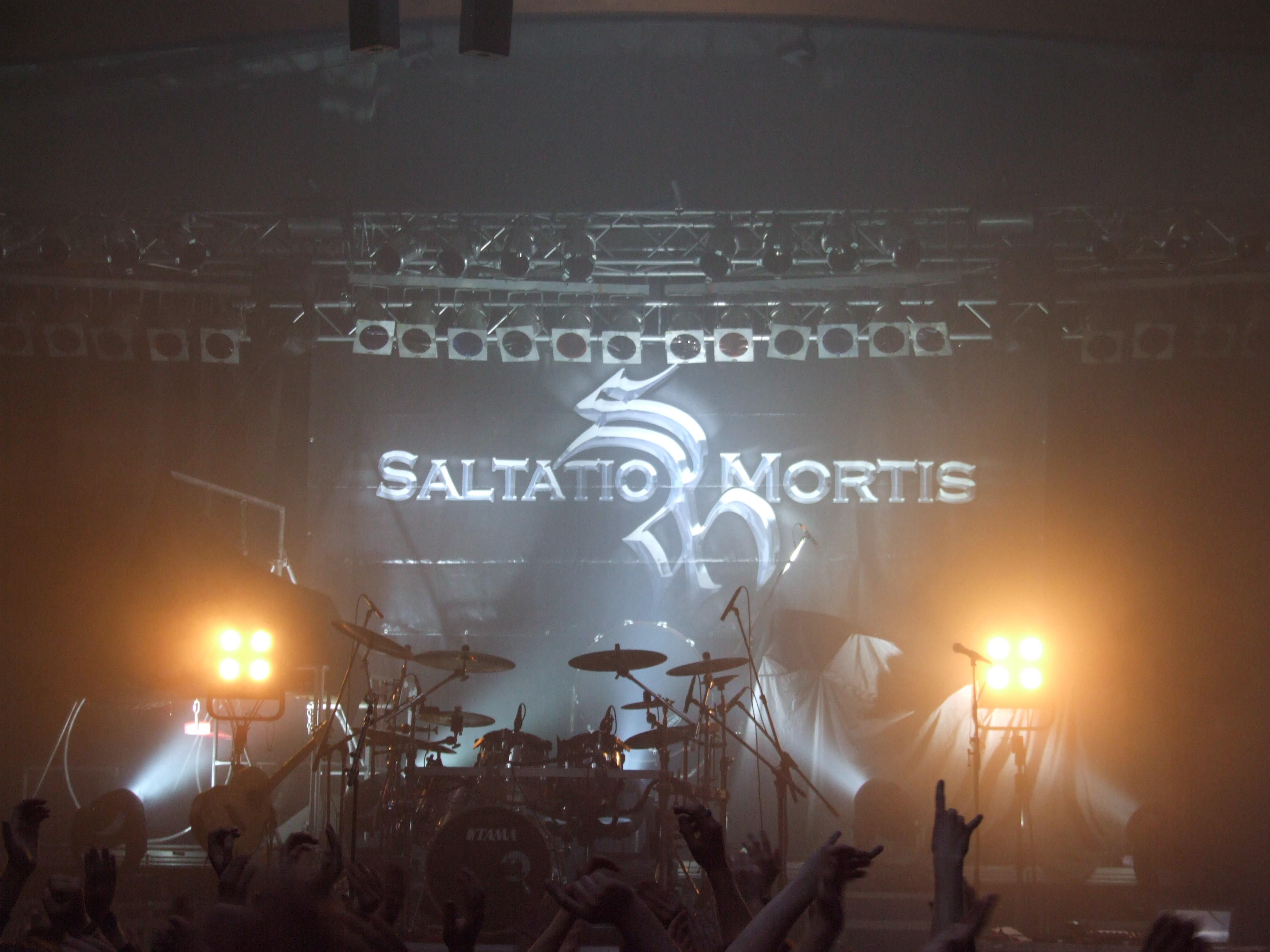 Logo von Saltatio Mortis, Sommerfesthalle, Otterstadt, Deutschland